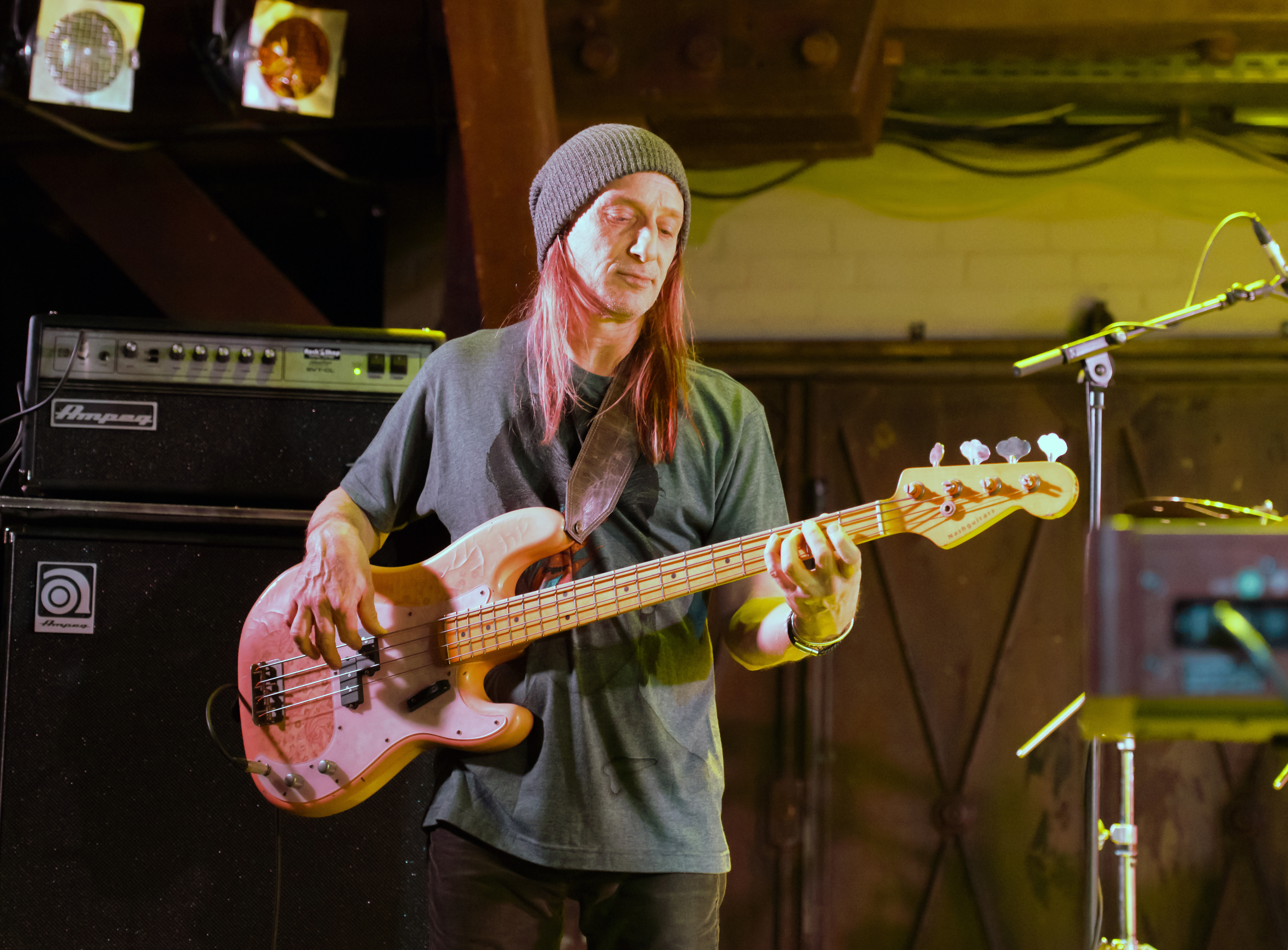 Greg Rzab in der Fabrik Hamburg 2017